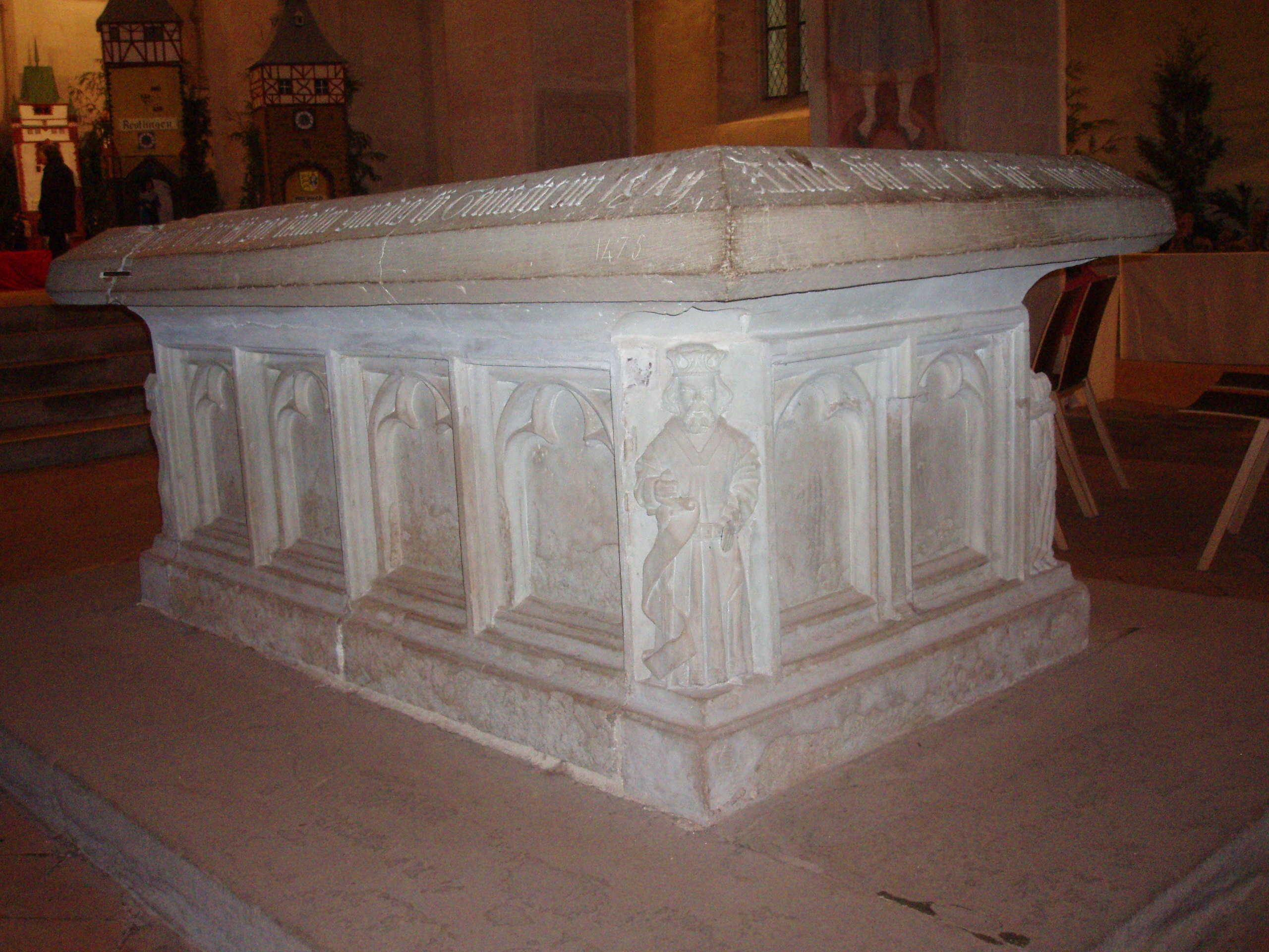 Sarkophag in der Klosterkirche Lorch